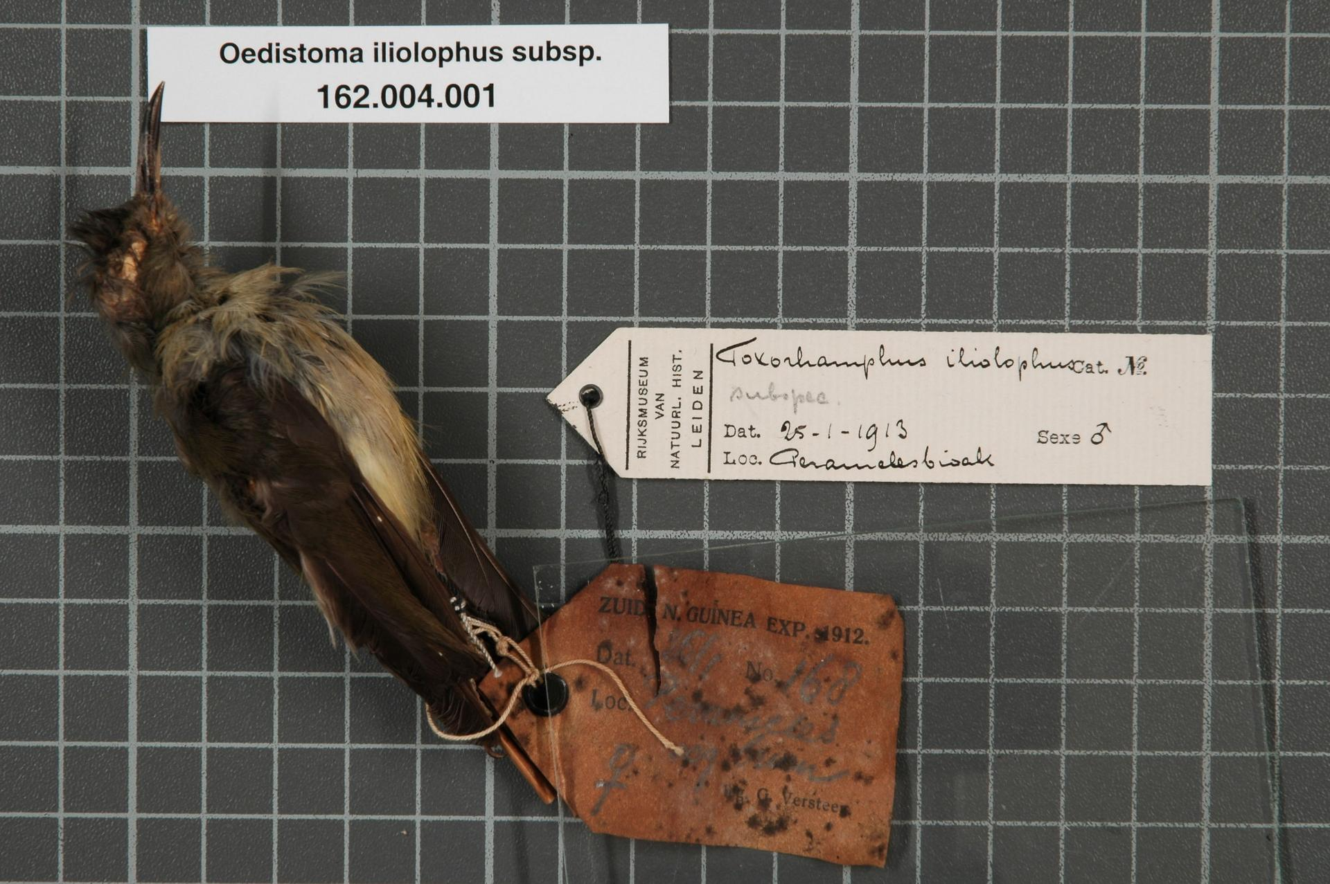 Oedistoma iliolophus subsp.